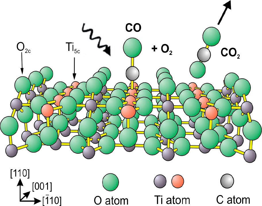 Het.kat - titán-dioxid